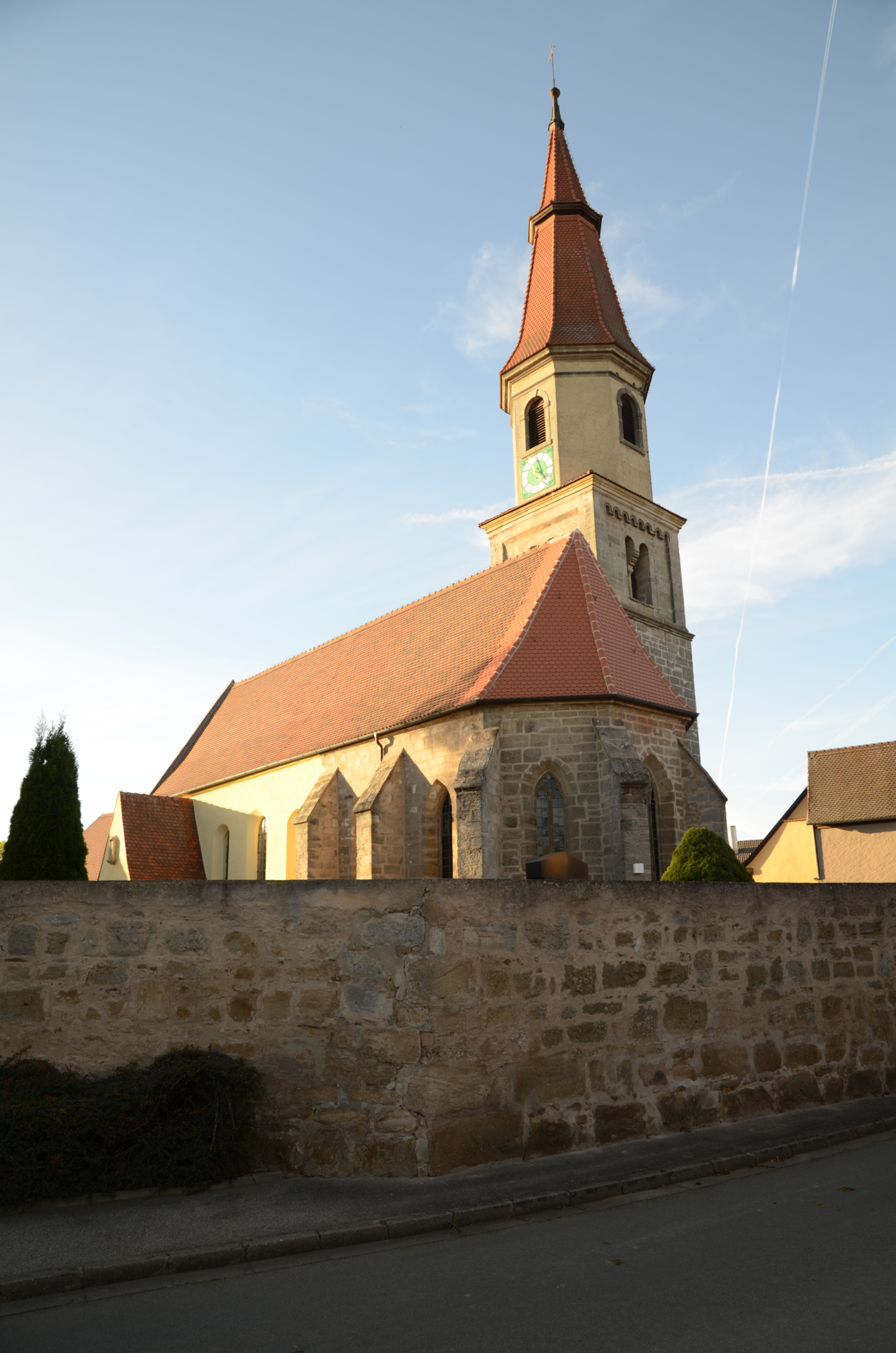 Sinnbronn, St. Peter